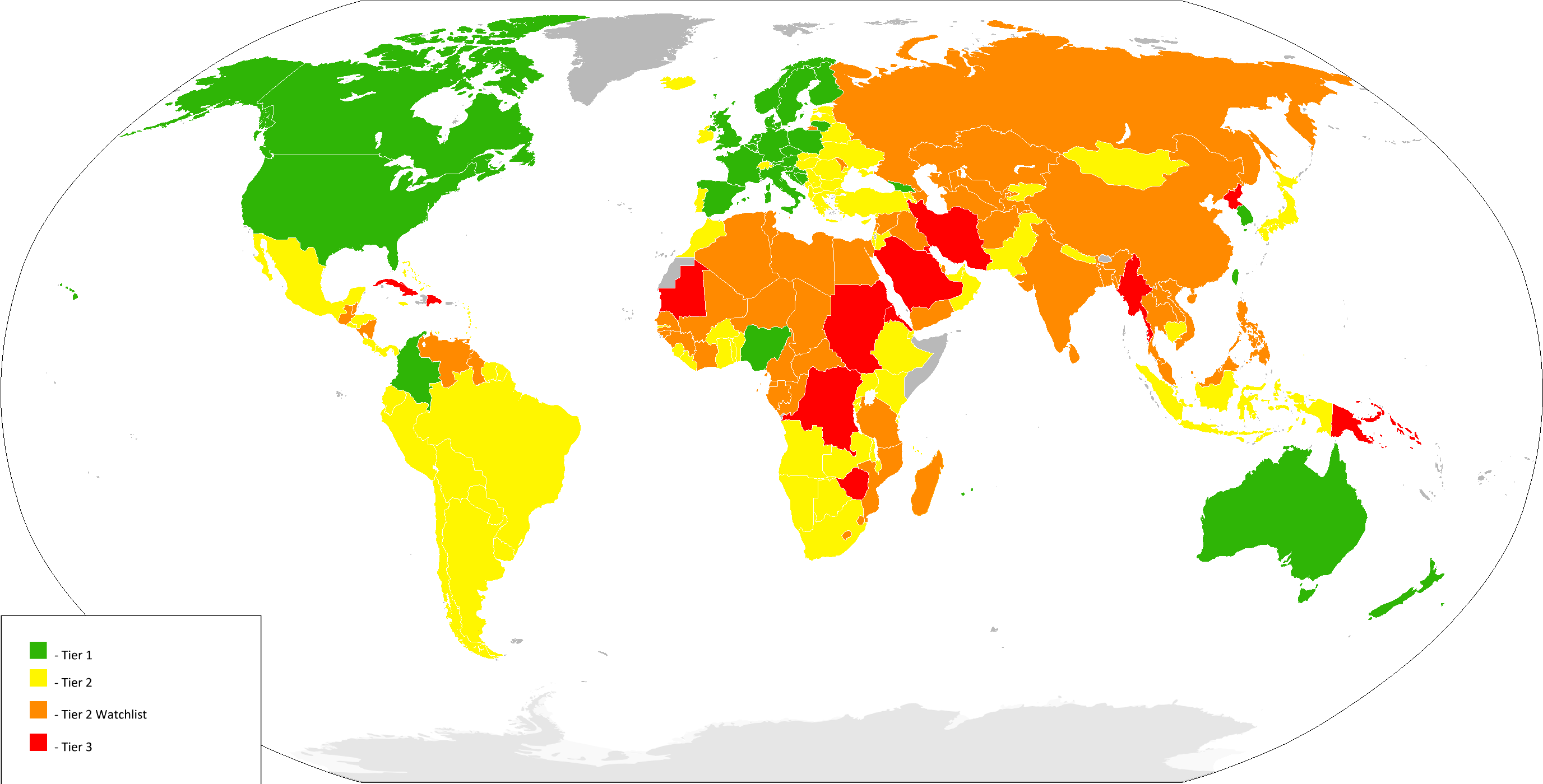 Trafficking In Persons Report Map 2010 Green: Tier 1 Yellow: Tier 2 Orange: Tier 2 Watchlist Red: Tier 4